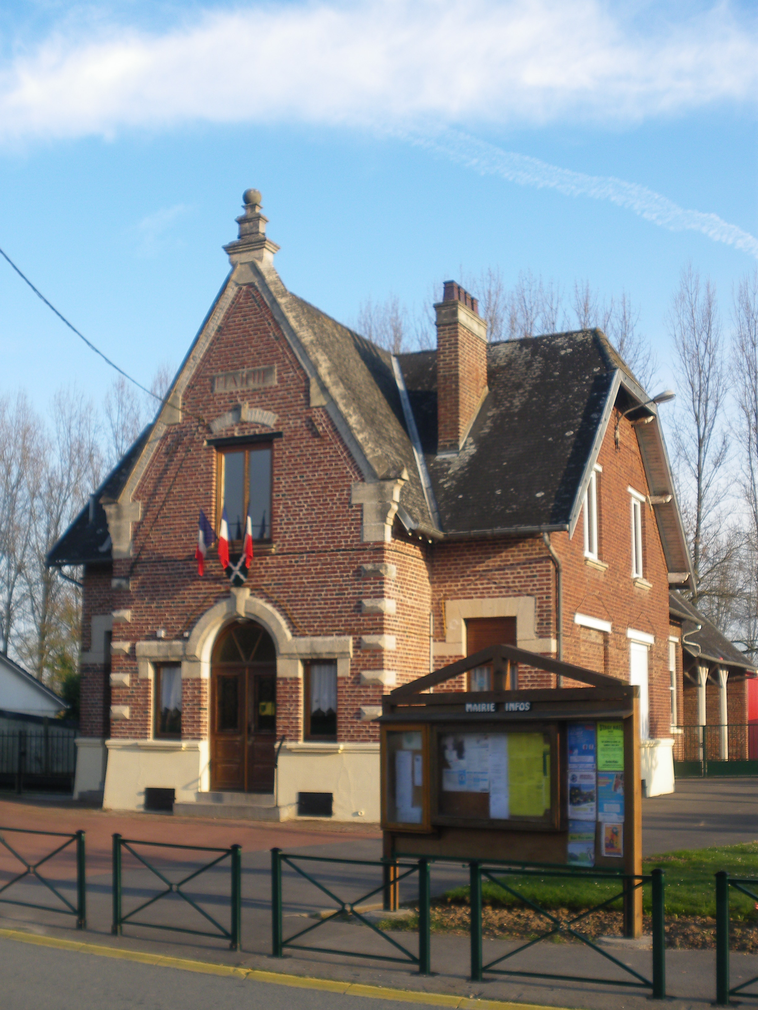 Vue de la mairie de Boiry-Becquerelle.